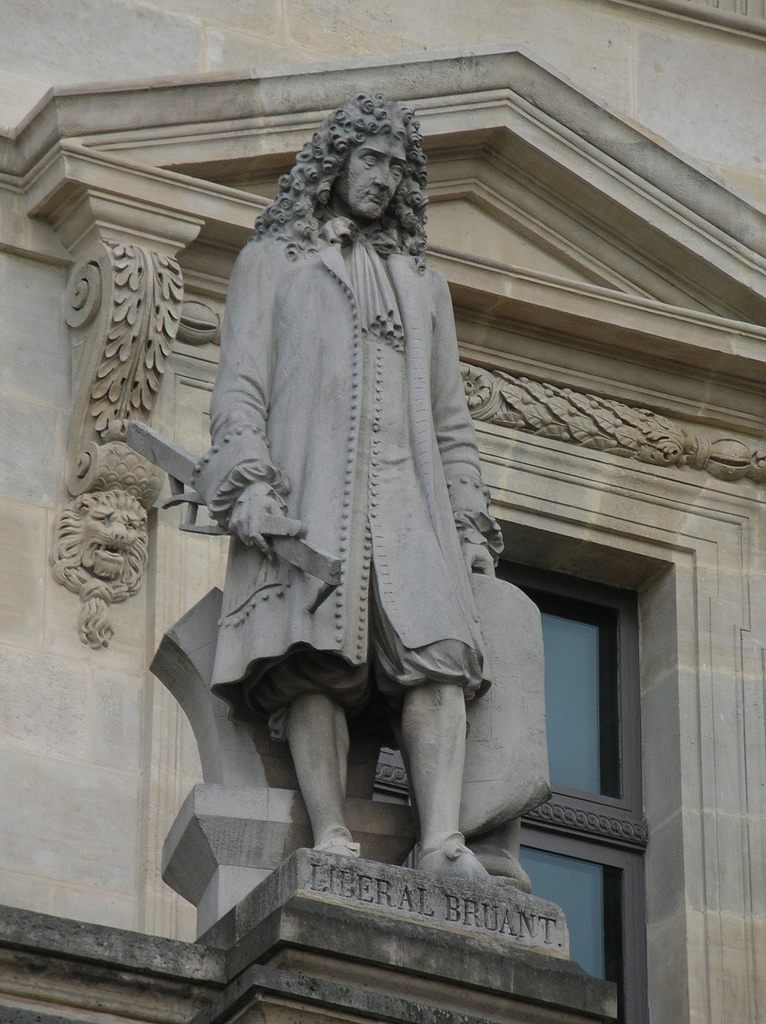 Armand Toussaint: Libéral Bruant, statue, décor de l'aile en retour Mollien, Cour Napoléon du Palais du Louvre, Ier arrondissment, Paris, France.